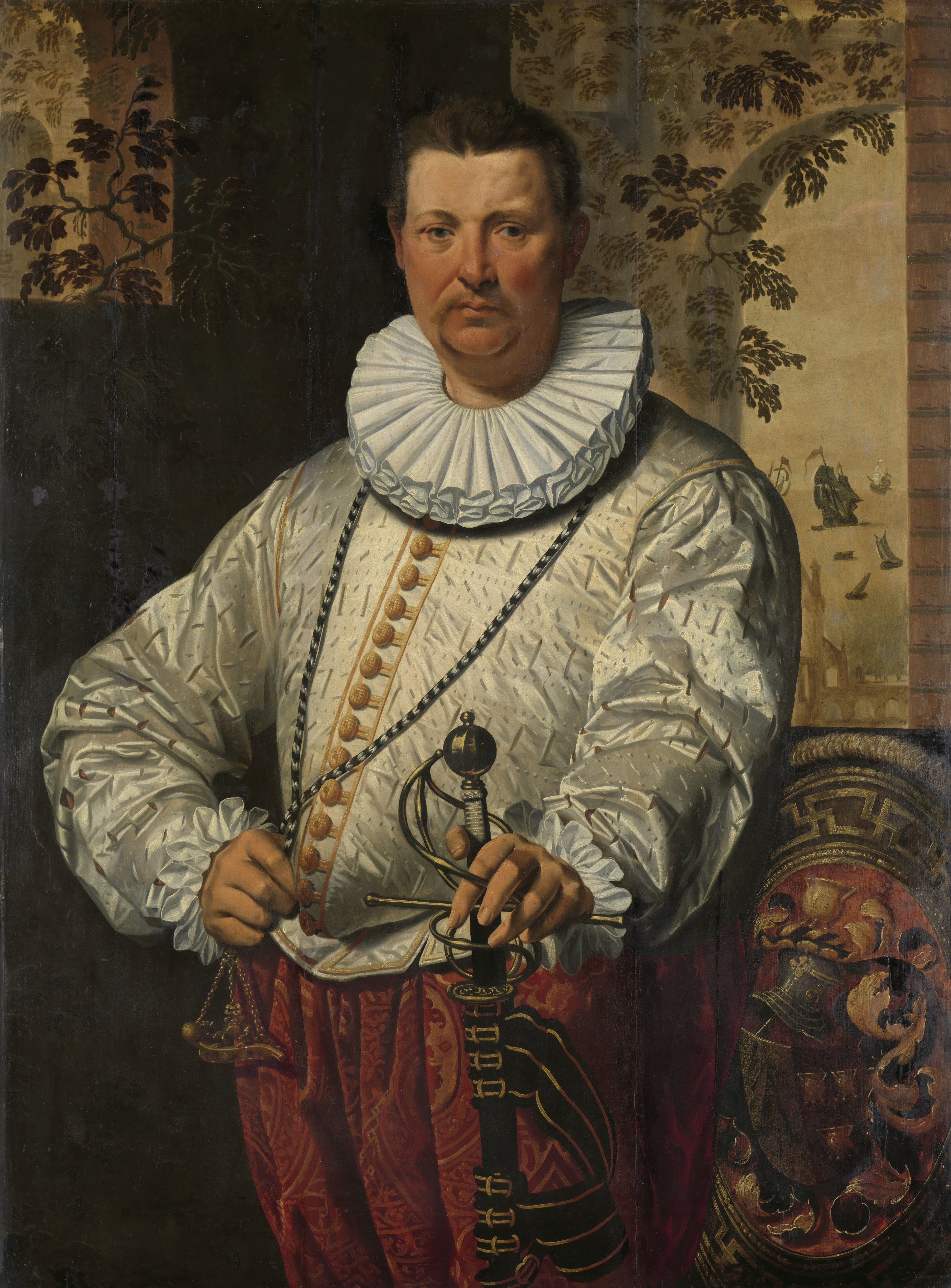 Portret van een Hollandse vlootvoogd. Kniestuk, staande voor een met klimop begroeide muur waarin een venster met uitzicht op zee met schepen. De linkerhand op een sabel, in de rechterhand de ketting waaraan een sifflet of bootsmansfluit hangt. Rechtsonder het familiewapen.